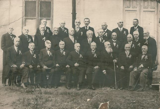 Снимка на офицери от Първи випуск на Софийското военно училище, снимали се на среща по повод 50 години от производството им в офицерски чин. Първи ред от ляво на дясно: първи Георги Абаджиев, втори Еньо Денчев, седми Илия Димитров, девети Христо Петрунов. Втори ред: Тодор Стоев, Пантелей Ценов, пети Васил Кутинчев, седми Стилиян Ковачев, осми Добри Бояджиев, десети Никола Иванов. Трети ред: първи Христо Паков, трети Никифор Никифоров, четвърти Бончо Балабанов, шести Кънчо Кънчев.